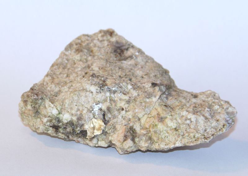 Pegmatyt z muskowitem. Szklarska Poręba - Skałka Teściowej.